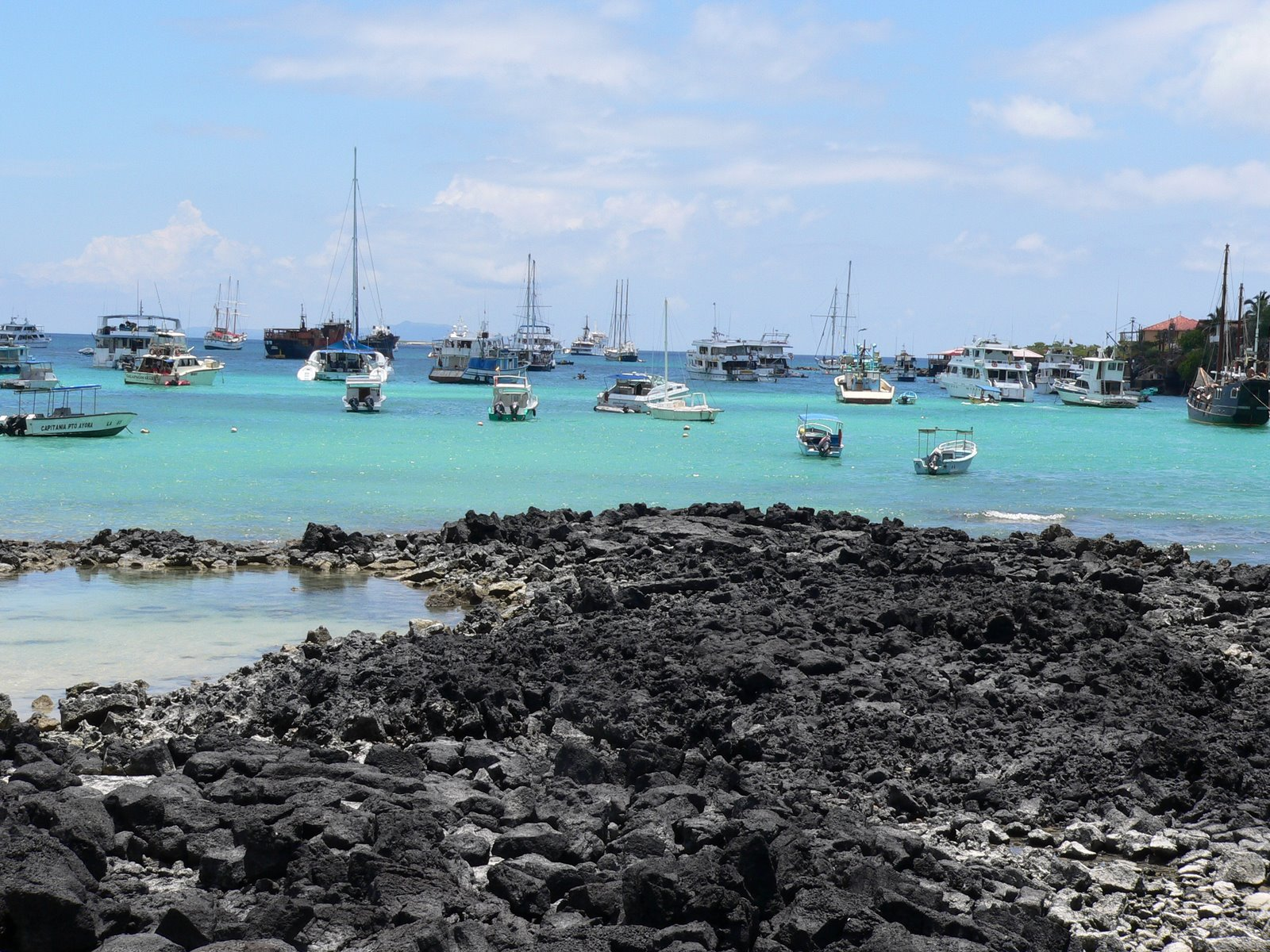 Puerto Ayora, Isla de Santa Cruz, Galapagos, Ecuador